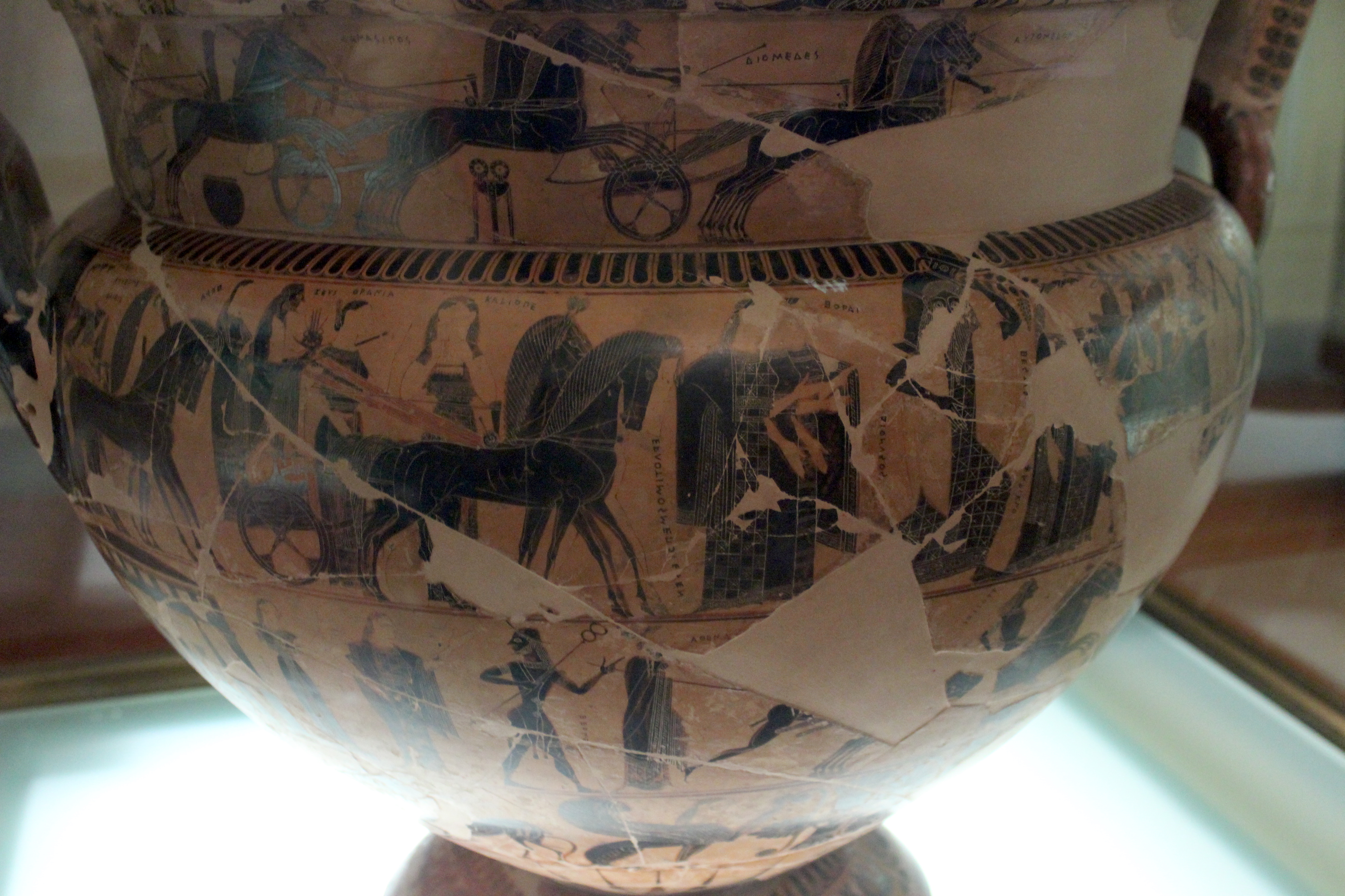 Florencia, Museo Arqueológico. Clitias, Vaso François.